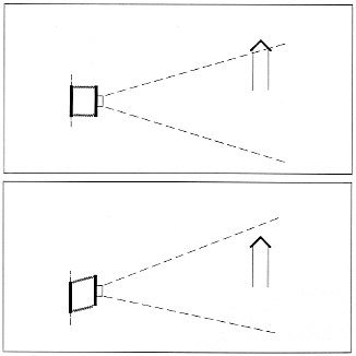 Illustration du décentrement.